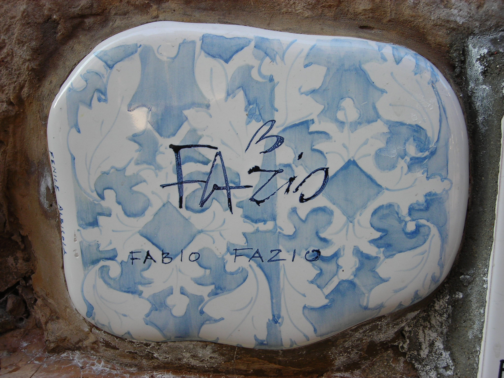 Piastrella del Muretto di Alassio autografata da Fabio Fazio